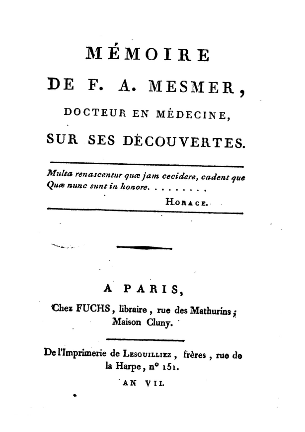 Português do Brasil: Memória de F. A. Mesmer, doutor em medicina, sobre suas descobertas